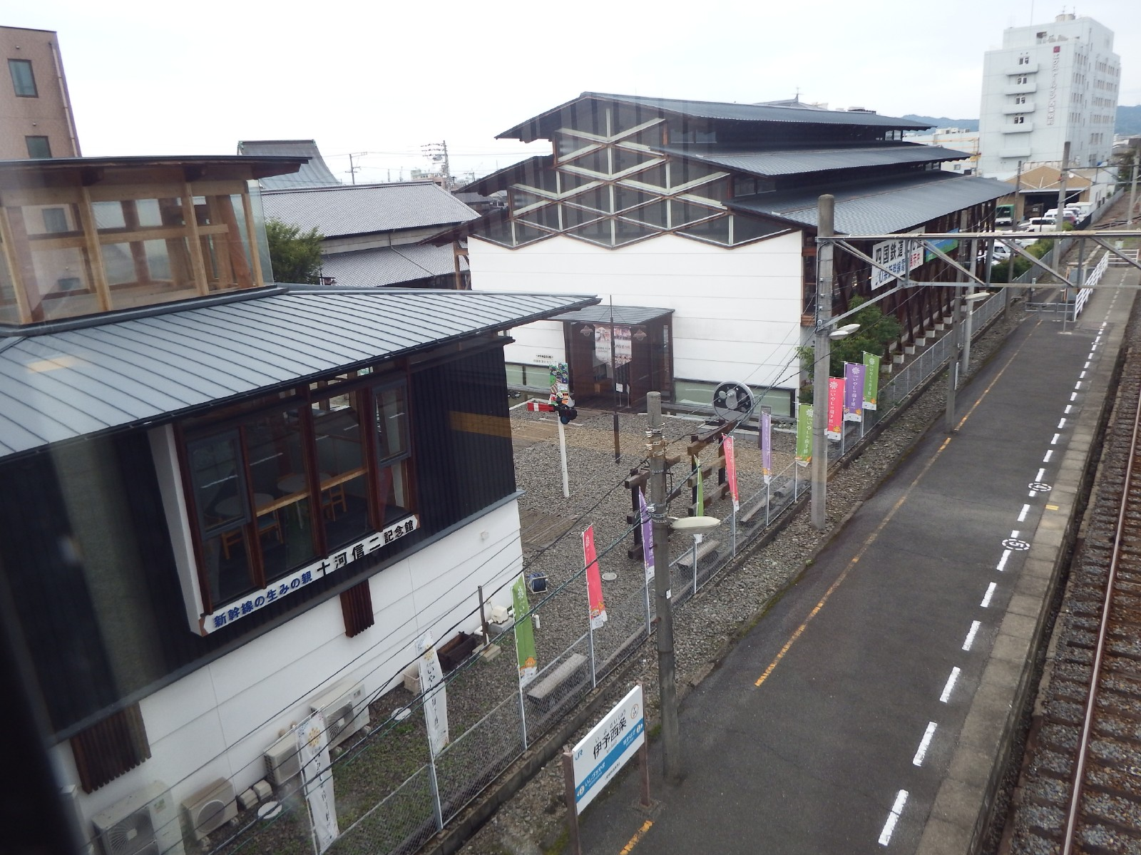 四国鉄道文化館の北館